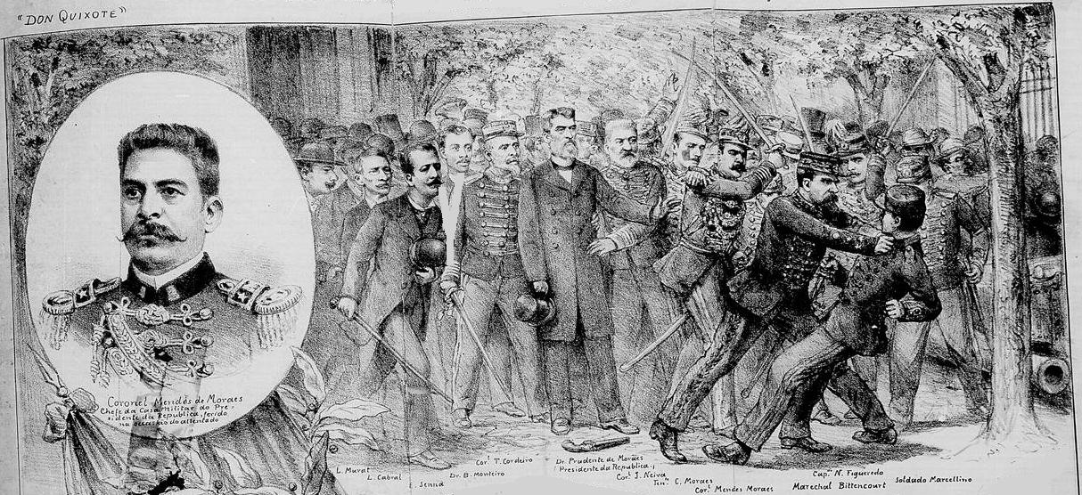 Atentado contra a vida do Presidente Prudente de Moraes, que acabou resultando na morte do então Ministro da Guerra, Mal. Bittencourt, no Arsenal de Guerra (05/11/1897). No detalhe, o então Coronel Mendes de Morais, chefe da Casa Militar, ferido na ocasião do atentado.